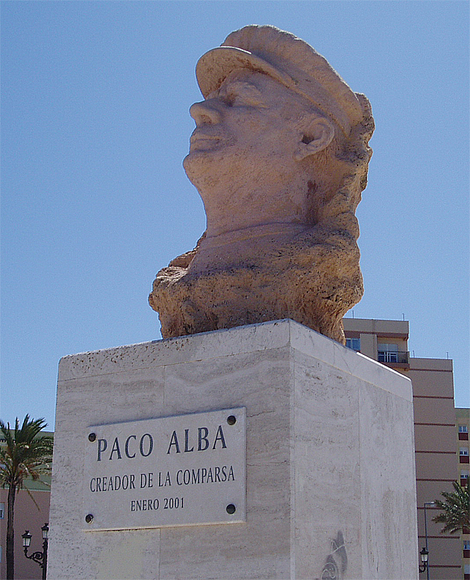 Estatua dedicada a Paco Alba en La Caleta. Cádiz, España.